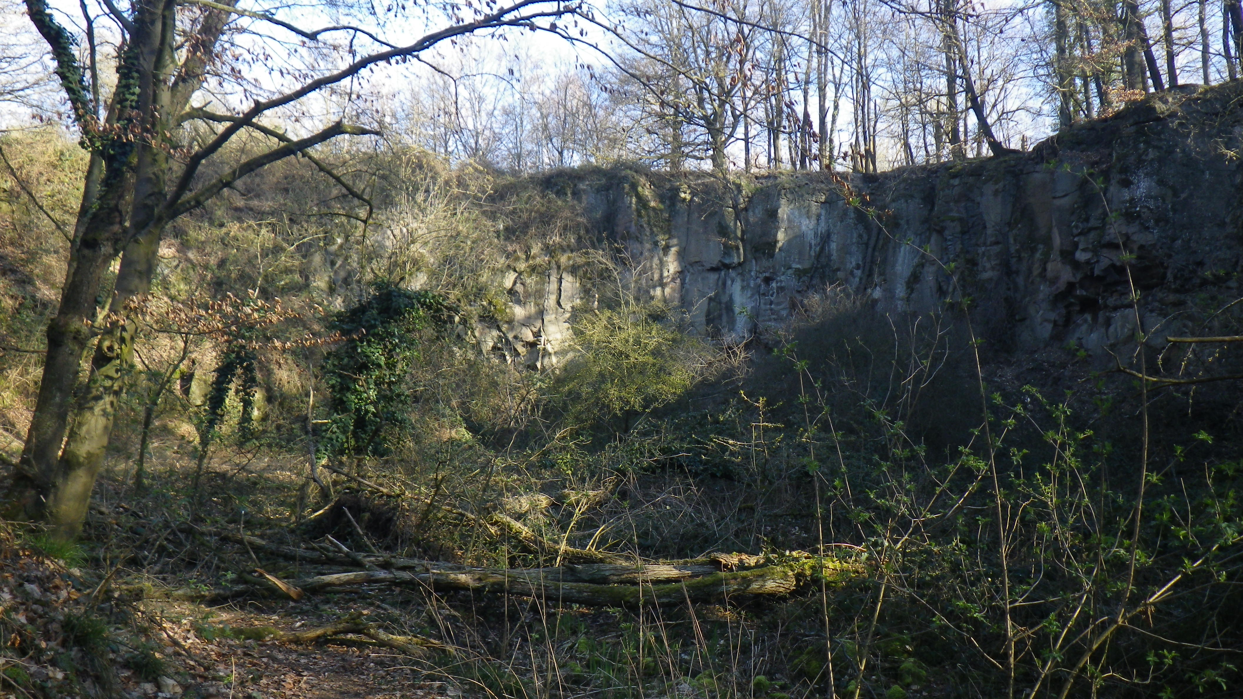 Aufgelassener Steinbruch in tholeiitischem Basalt im Ronneburger Wald (bei Altwiedermus)